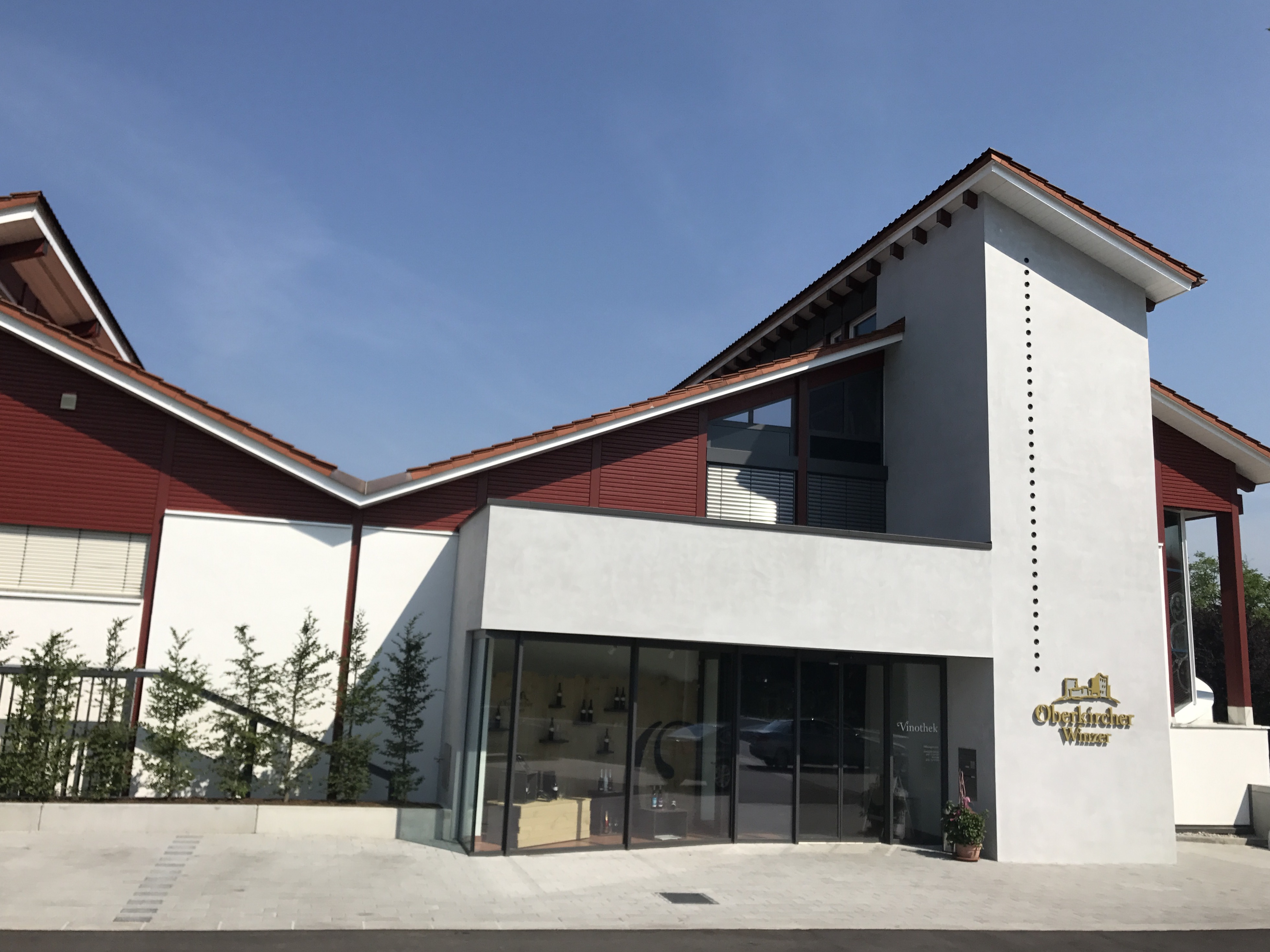 Eingang zur Vinothek der Oberkircher Winzer eG